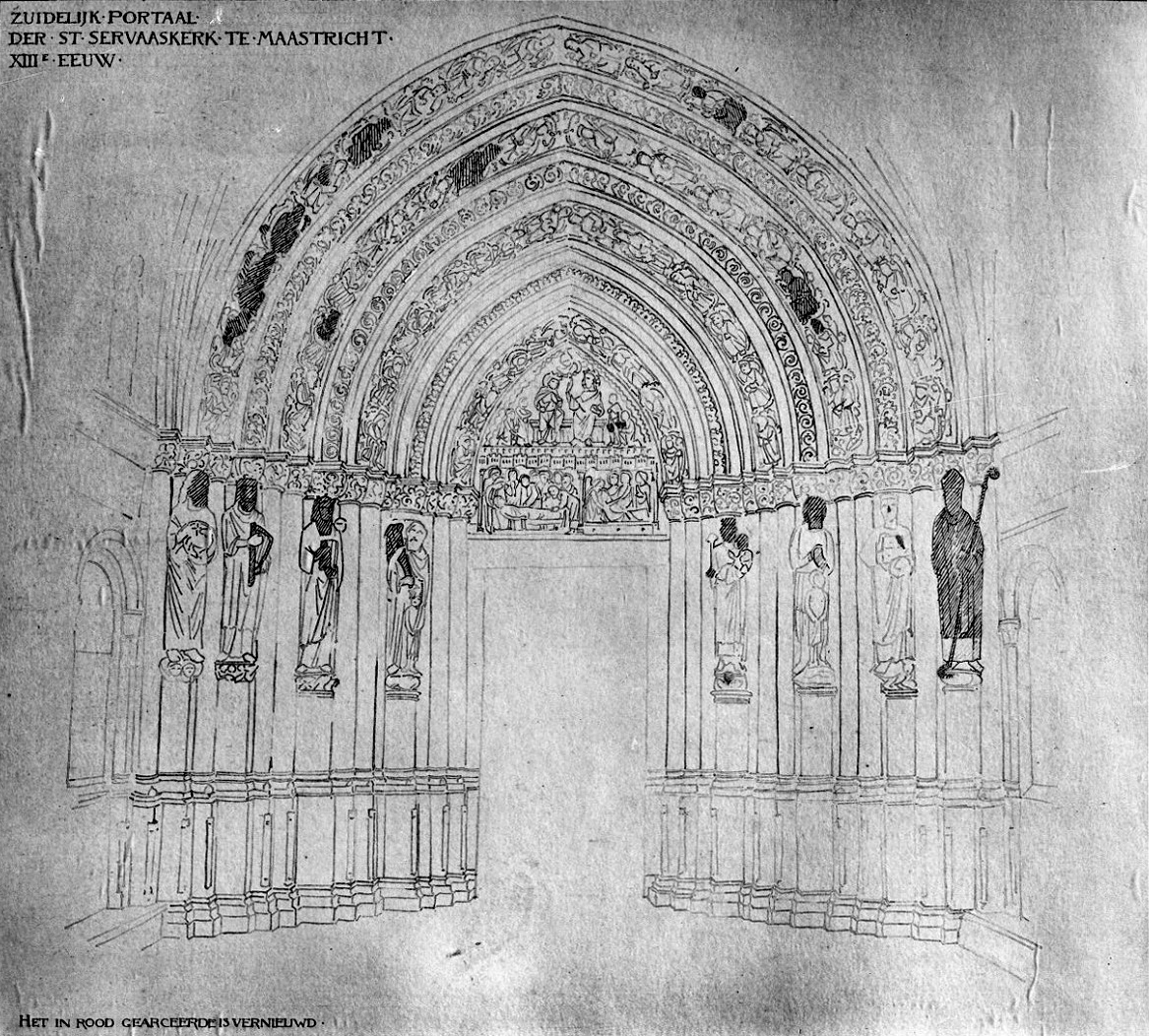 Sint Servaaskerk: zuid portaal, interieur met aanduiding van vernieuwd beeldhouwwerk